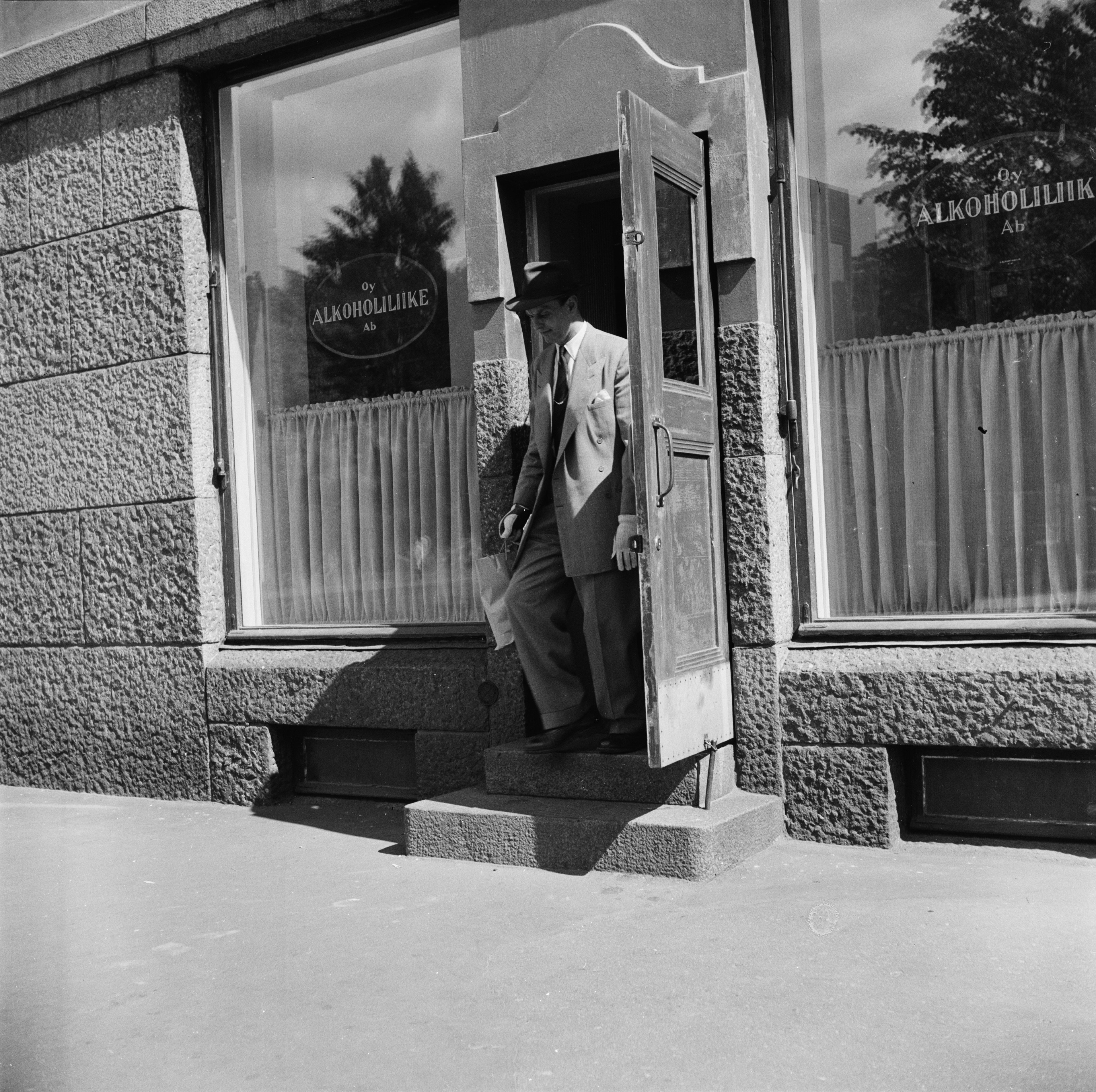 Alkoholiliike, Museokatu 10; negatiivi, filmi, mv